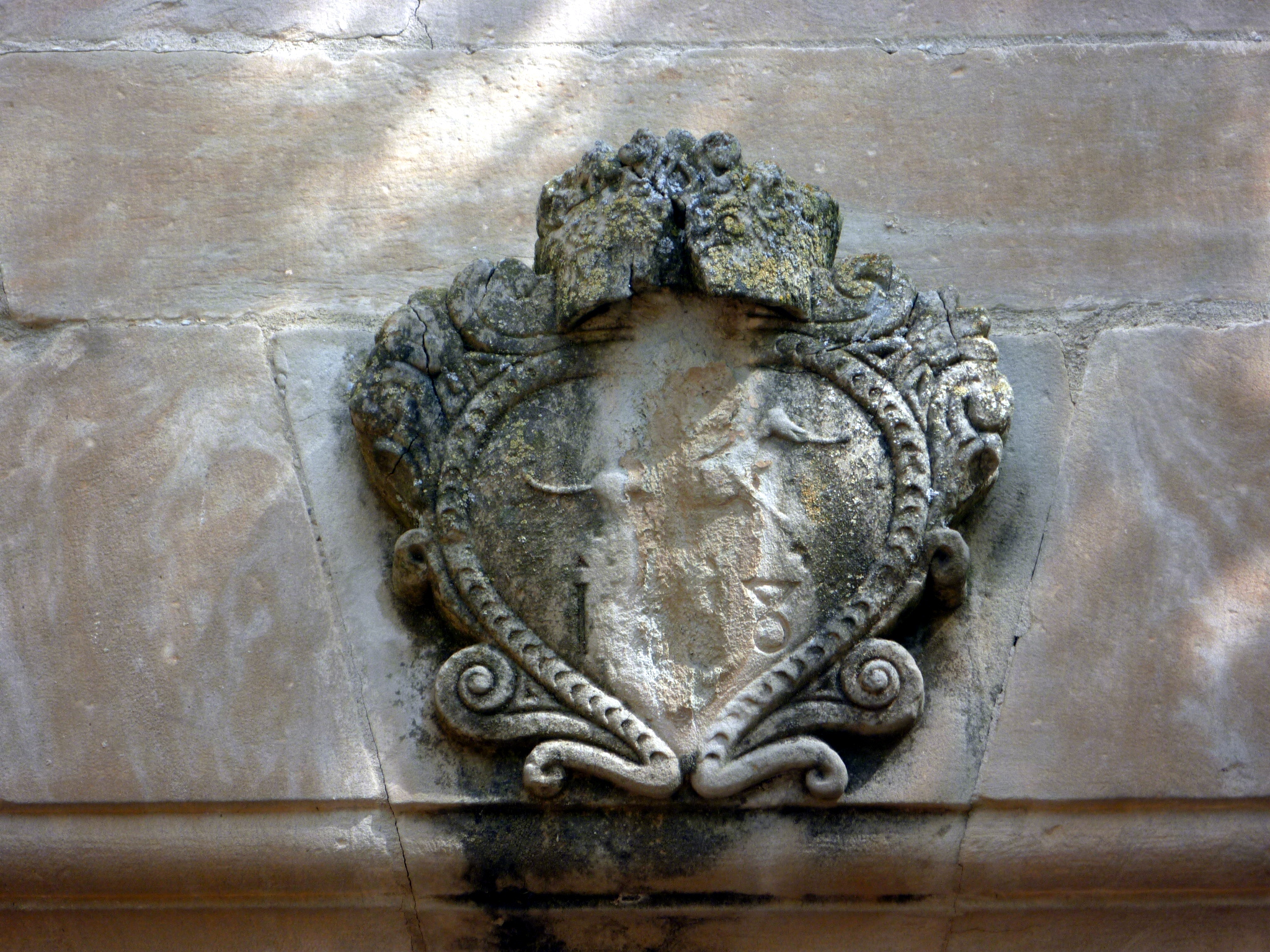 Església parroquial de Santa Maria Magdalena de Vergós Guerrejat (Estaràs), llinda de la portada